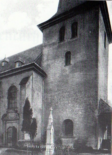 St. Nikolaus Altengeseke\St. Nikolaus Altengeseke, Teilansicht von Südwesten , Albert Ludorff, Foto vor 1910